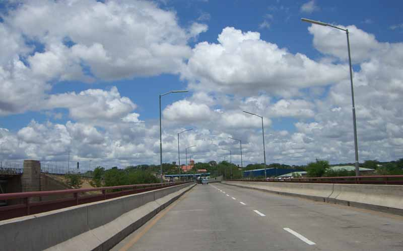 Аутор Радован Корда, 18. јануар 2006, нови мост преко реке Лимпопо код Беитбриџа.